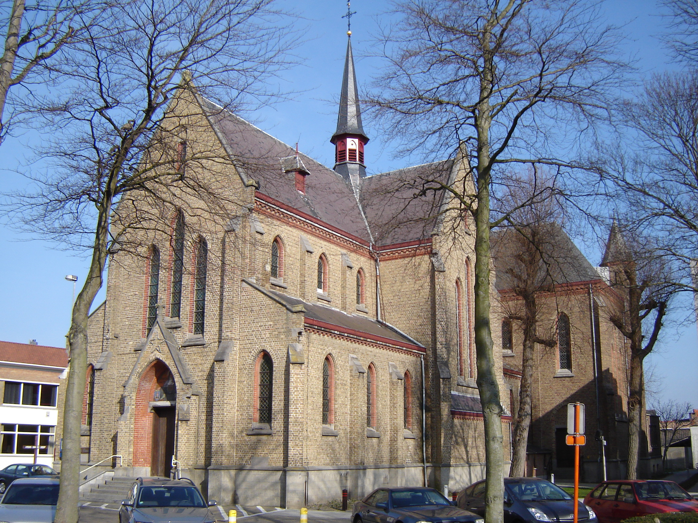 Sint-Monicakerk in De HaanChurch of Saint Monica in De Haan. De Haan, West Flanders, Belgium